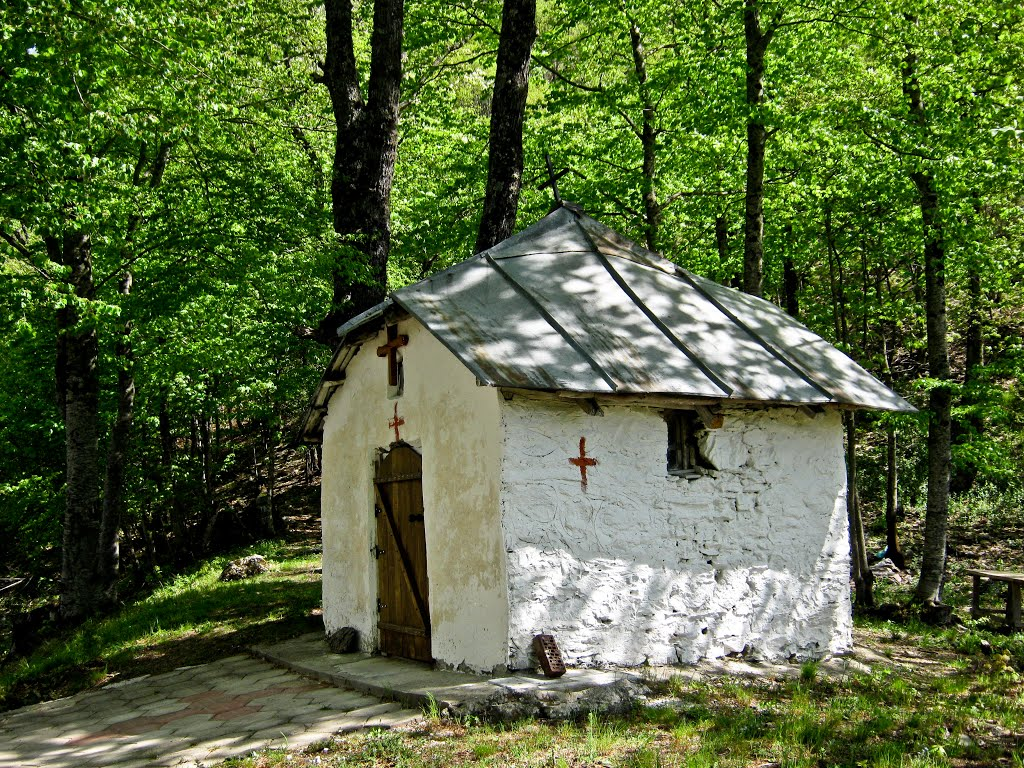 Св Мина Село Јеловце